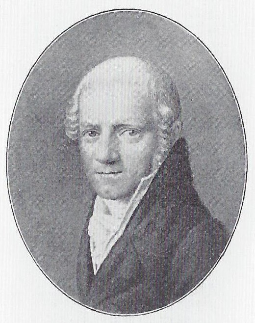 Johann Friedrich Gottlieb Delbrück, Miniaturbildnis, um 1810